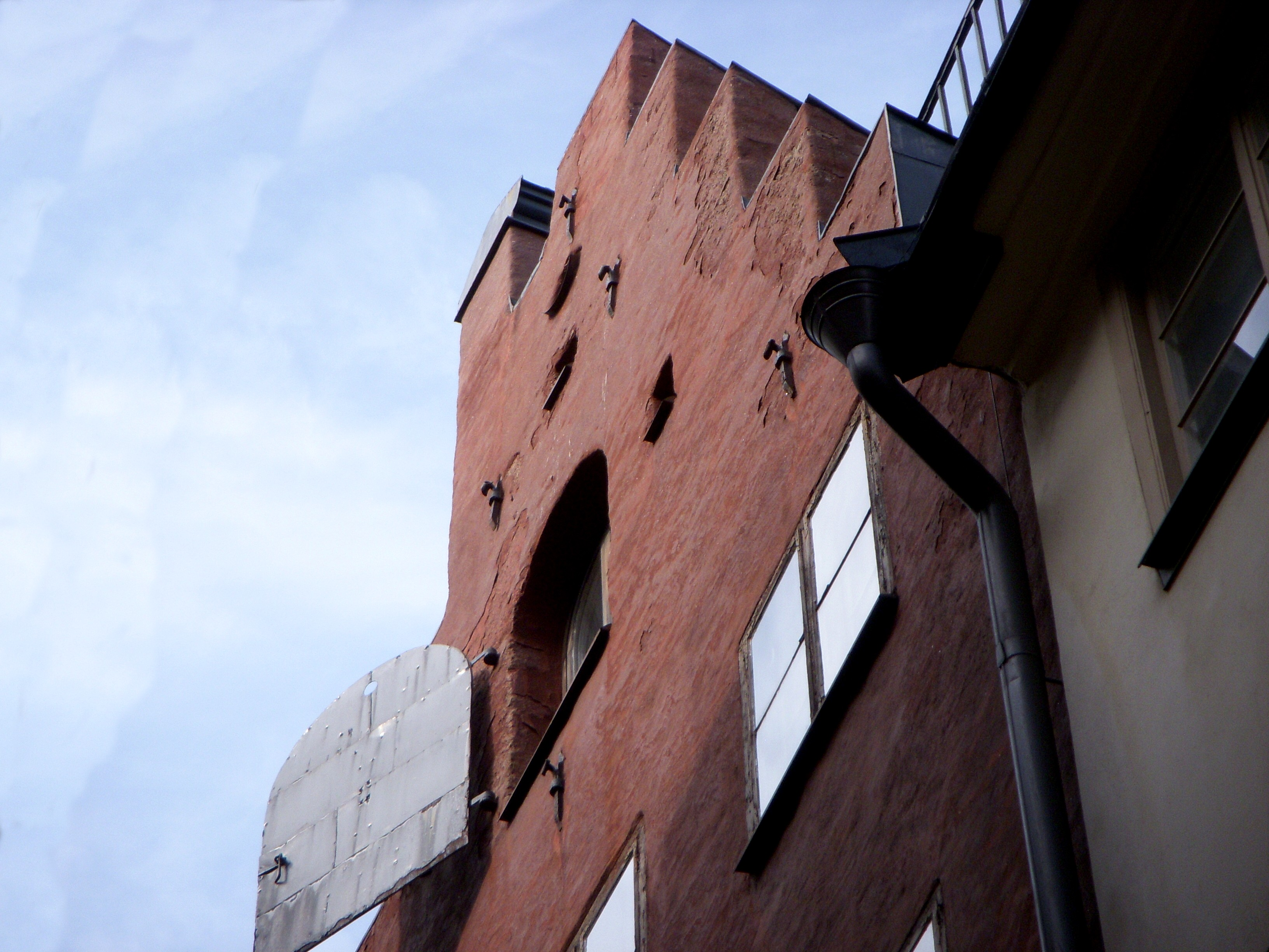 Vindaragarlagets hus i Gamla stan, trappgaveln och hissöppningen